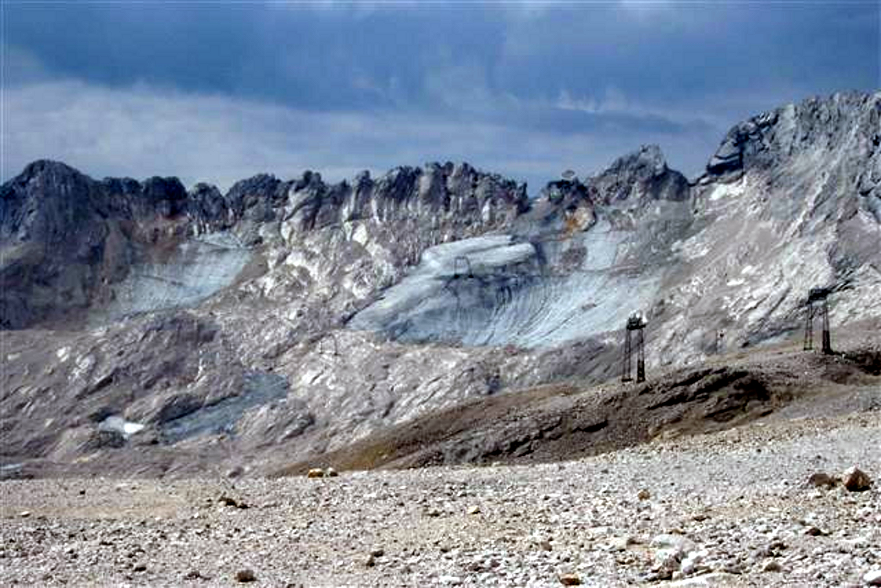 Südlicher Schneeferner